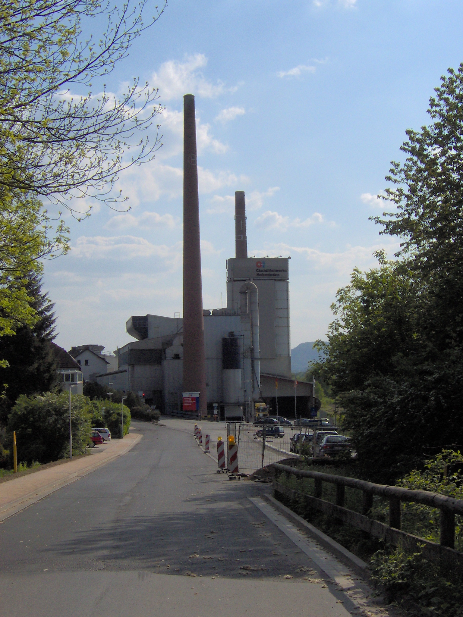 Die Glashüttenwerke in Holzminden. Das Werk gehört als Unternehmen O-I BSN Glasspack GmbH & Co KG zum O-I-Konzern, Owens-Illinois, Inc., Perrysburg, Ohio, USA